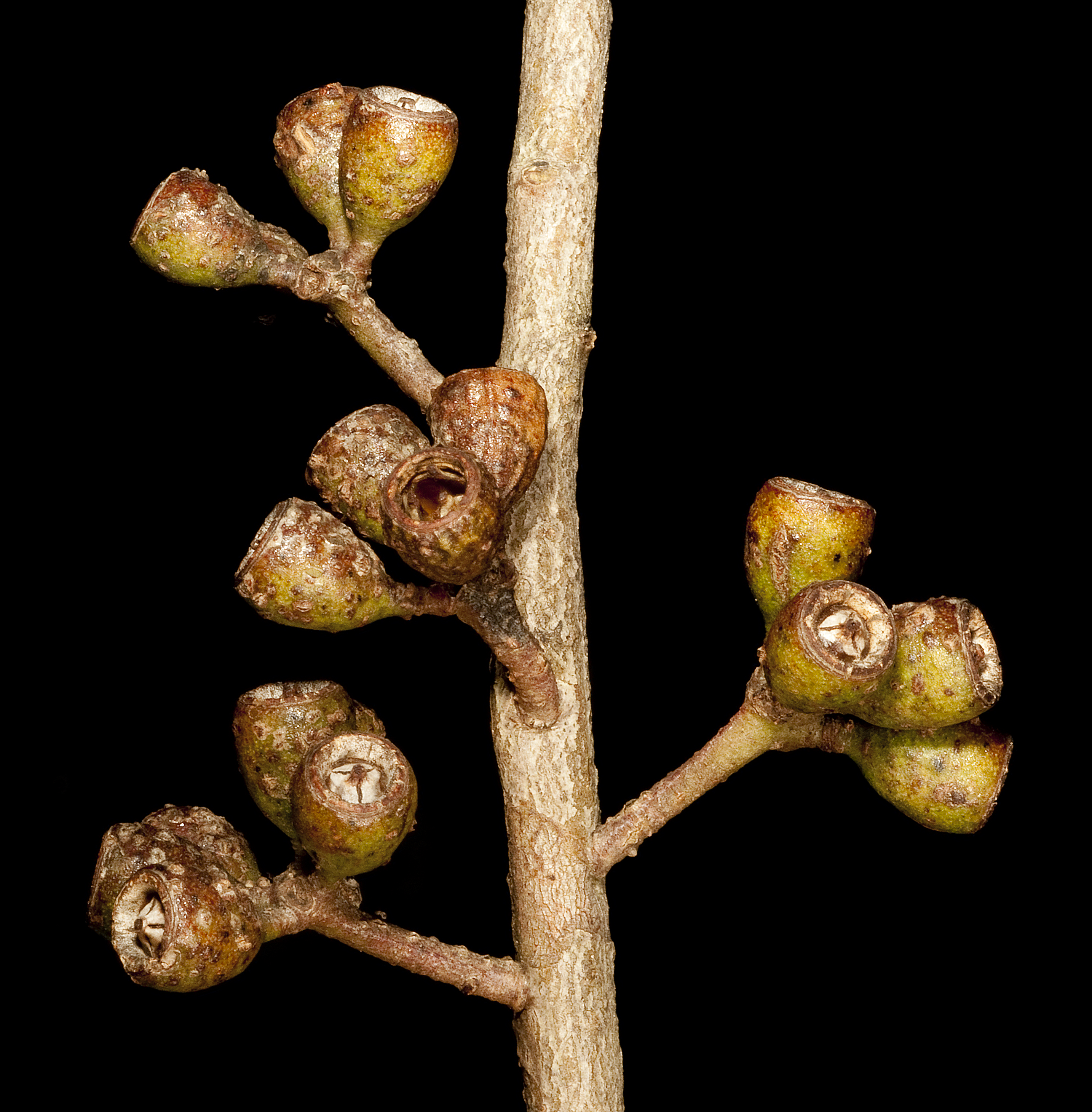 KRT4547